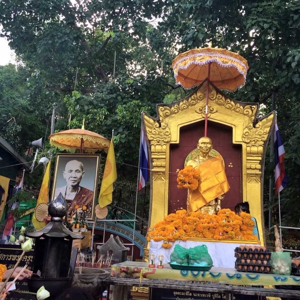 อนุสาวรีย์ครูบาศรีวิชัย